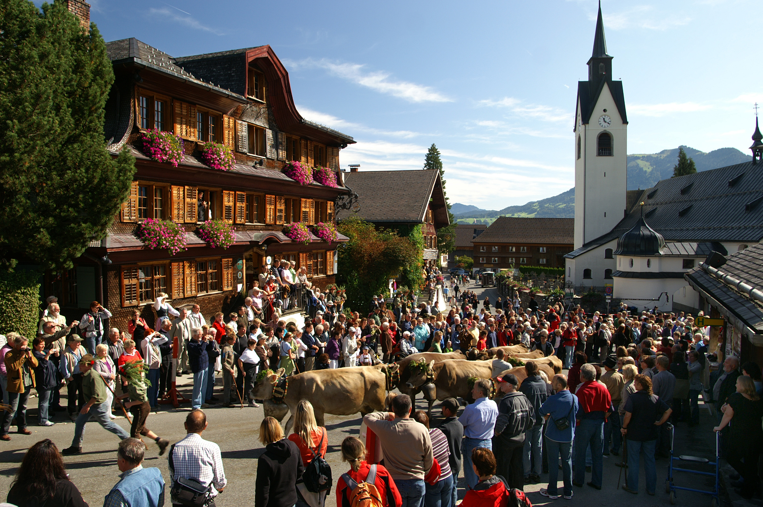 Der Schwarzenberger Alptag mit dem traditionellen Almabtrieb am 15. September.